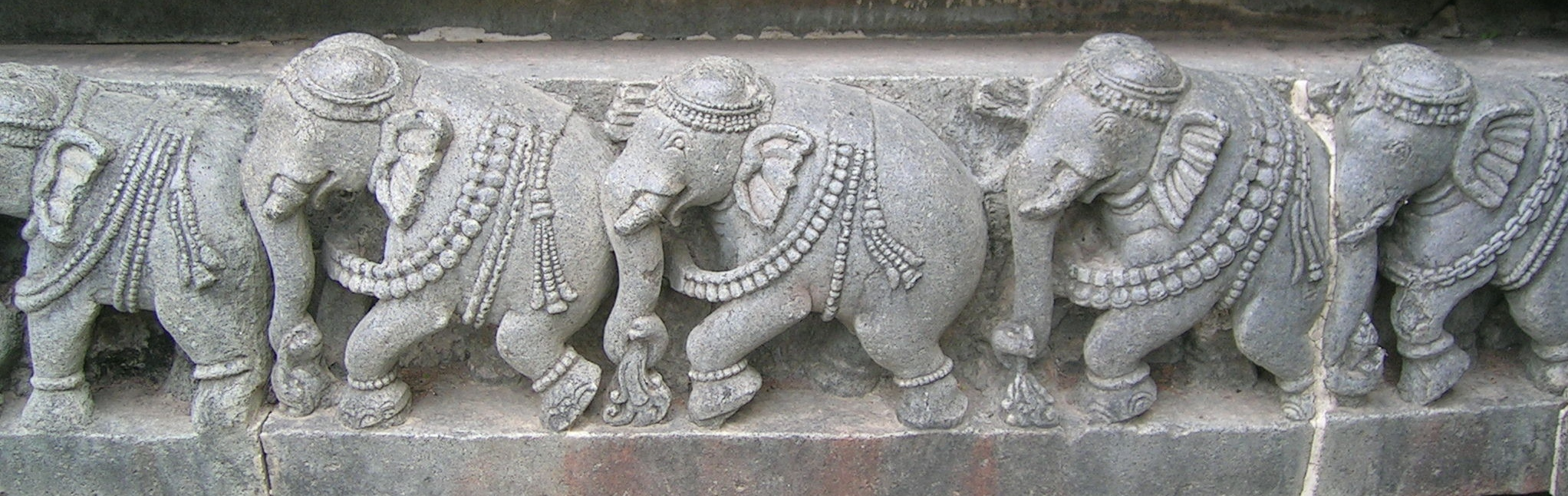 Elephants in Belur temple, Karnataka